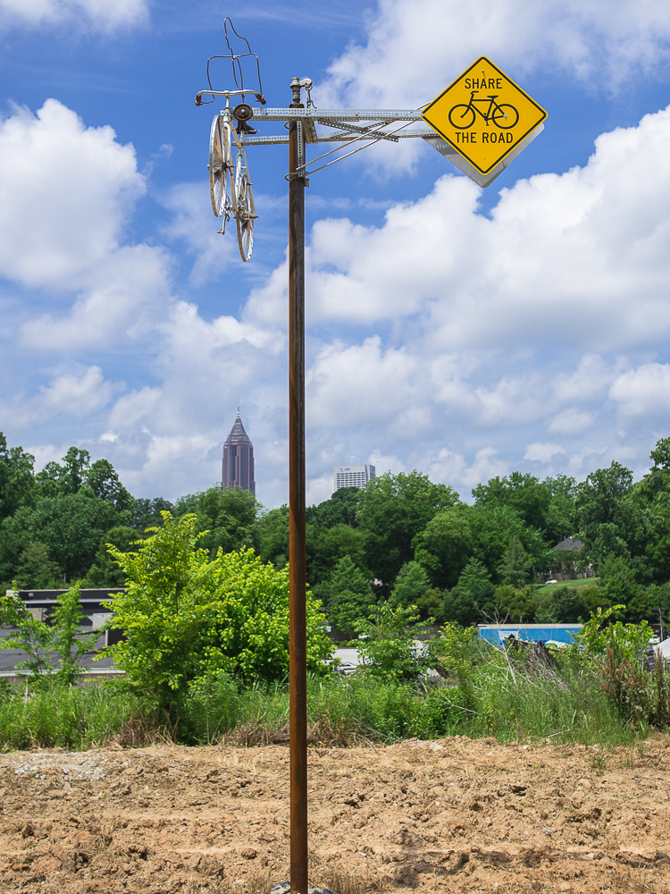 Art on Atlanta BeltLine